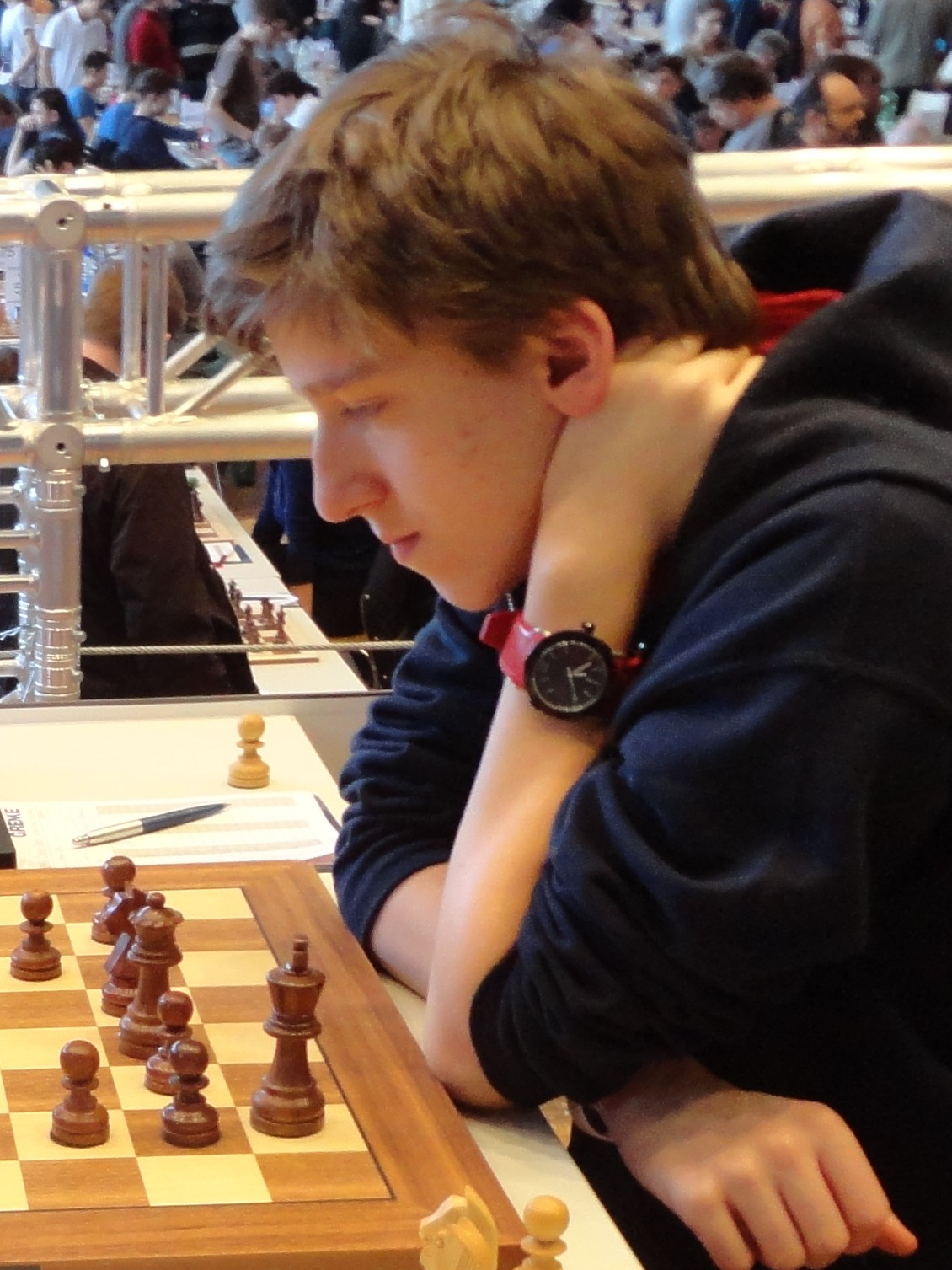 Benjamin Gledura, Grenke Chess Open 2016, Runde 9 in Karlsruhe.